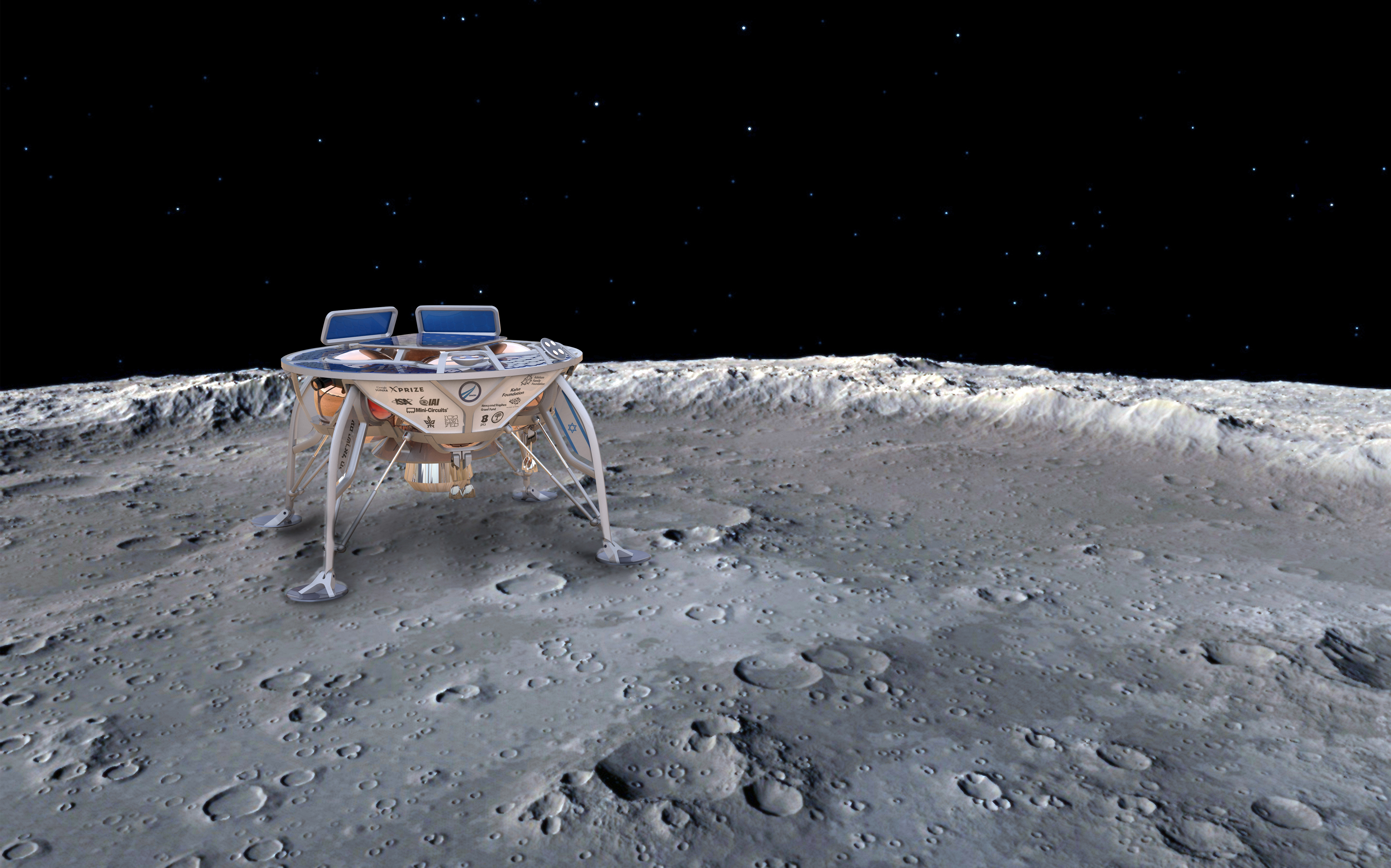 הדמיית דגם החללית על הירח